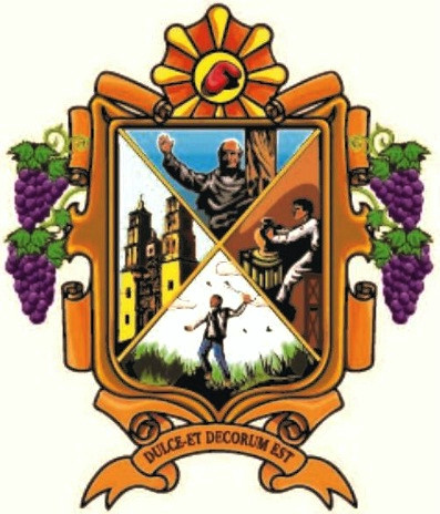 Escudo de Dolores Hidalgo, Guanajuato, México. "Dulce et Decorum est".